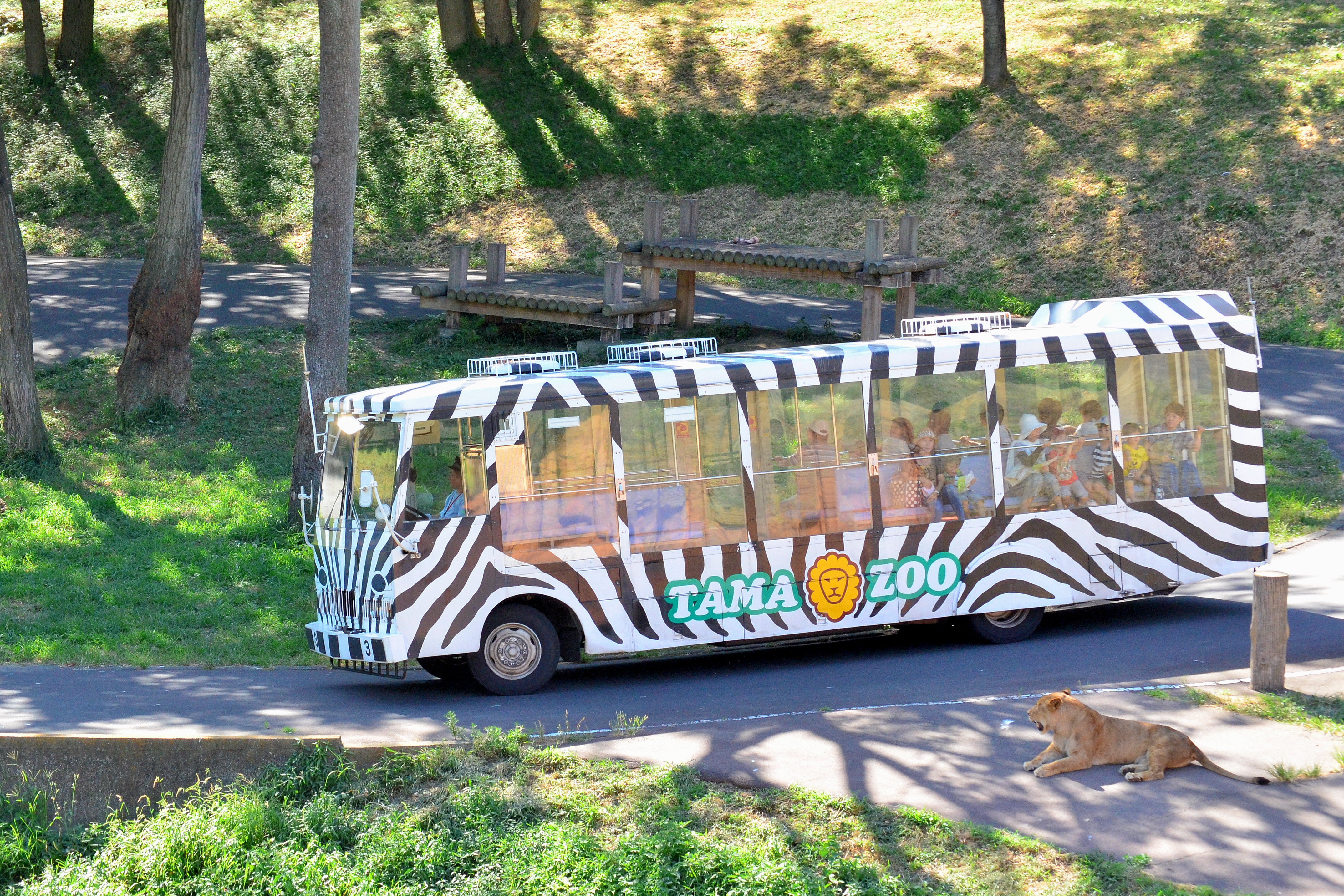 2012年8月2日木曜日、多摩動物公園にて、Nikon D5100 + AF-S DX VR Zoom Nikkor ED 55-200mm F4-5.6Gで撮影。